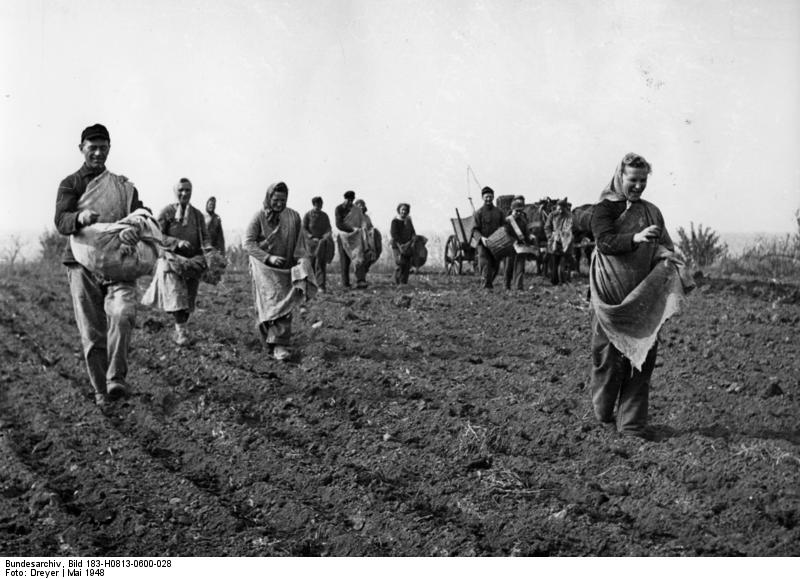 Insel Poel, Legen der Kartoffeln Zentralbild /Dreyer, Mai 1948. Landesgut (Tierzuchtgut) Kaltenhof auf der Insel Poel, Kreis Wismar, Bezirk Rostock. U.B.z.: die Feldbrigade beim Kartoffellegen.